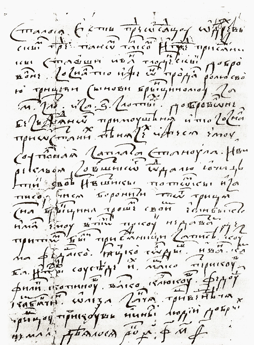 Odrzechowa, dokument z roku 1549, włościanin Jan Głodenski sprzedaje włościaninowi Hrycowi, synowi Bryncyna , swoją ziemię.